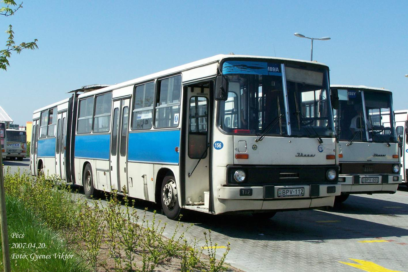 Ikarus 280-as Pécsett az M89A vonalon